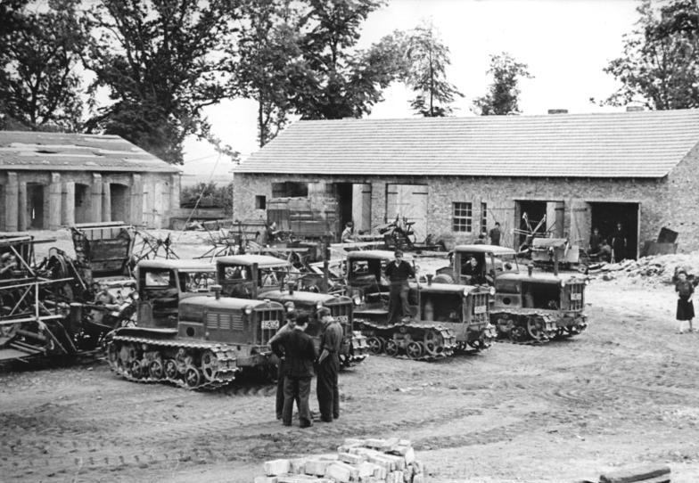 Sachsendorf, Maschinenpark der MAS ADN-ZB Blunck 1950 MAS Sachsendorf Bezirk Frankfurt-Oder. Aufn. 1950.